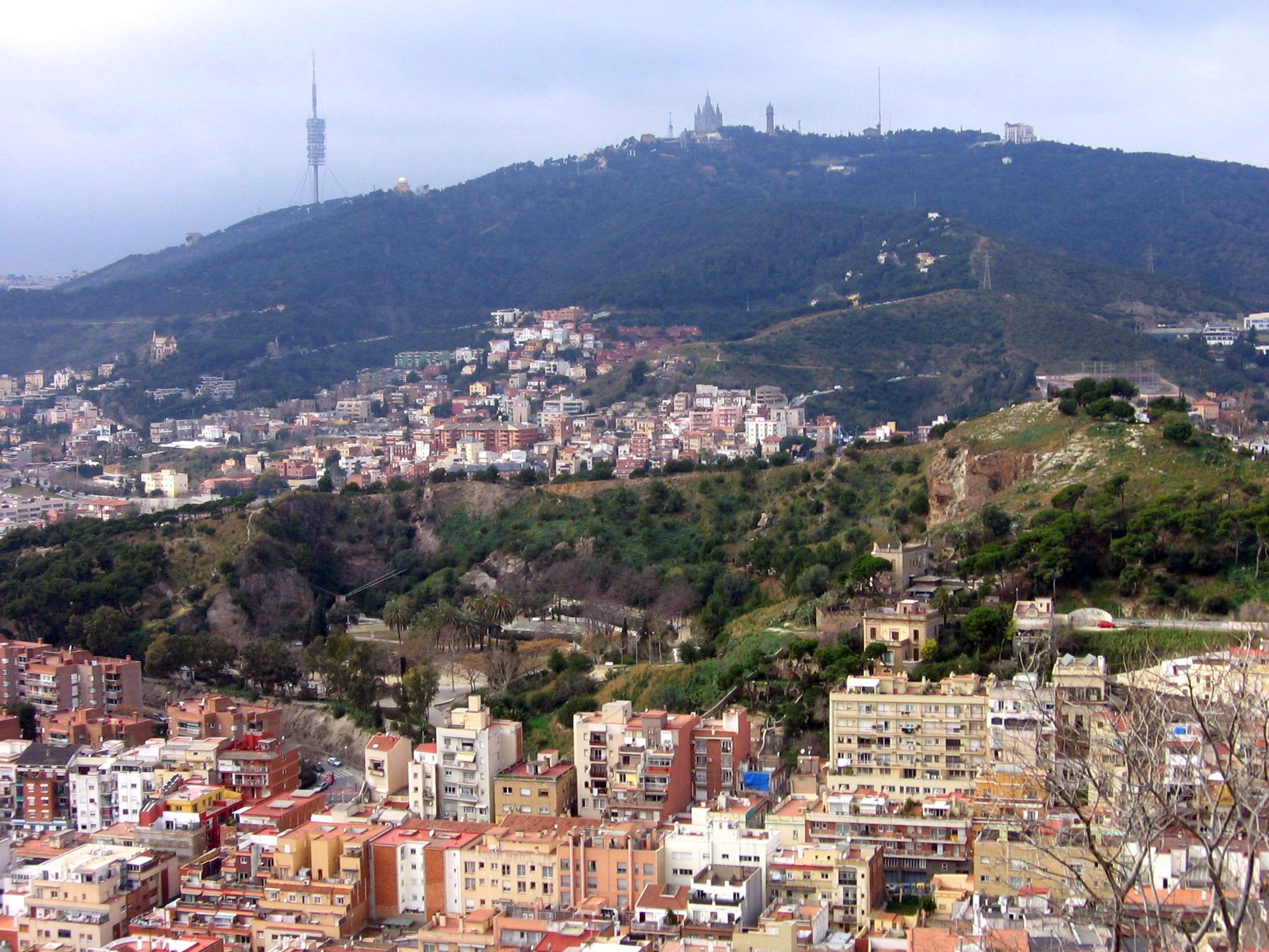 Parque de la Creueta del Coll, Barcelona.